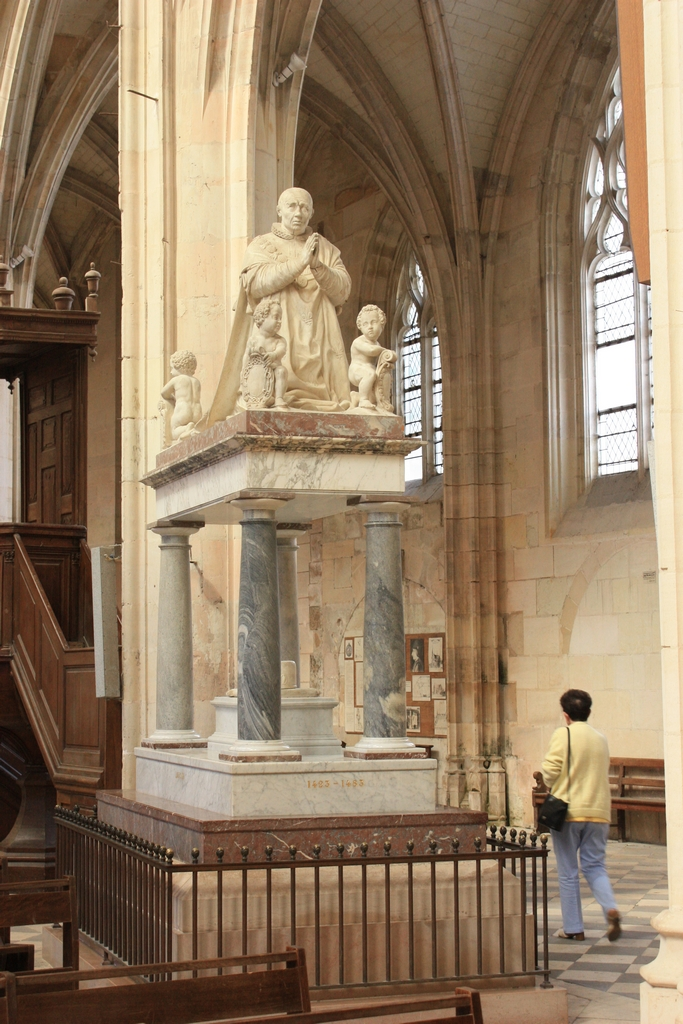 Tombeau de Louis XI, dans la nef de Notre Dame de Cléry